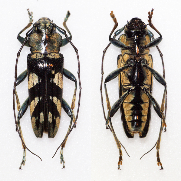 Breuning,1939 Sex: Female Data: ? Size: ?